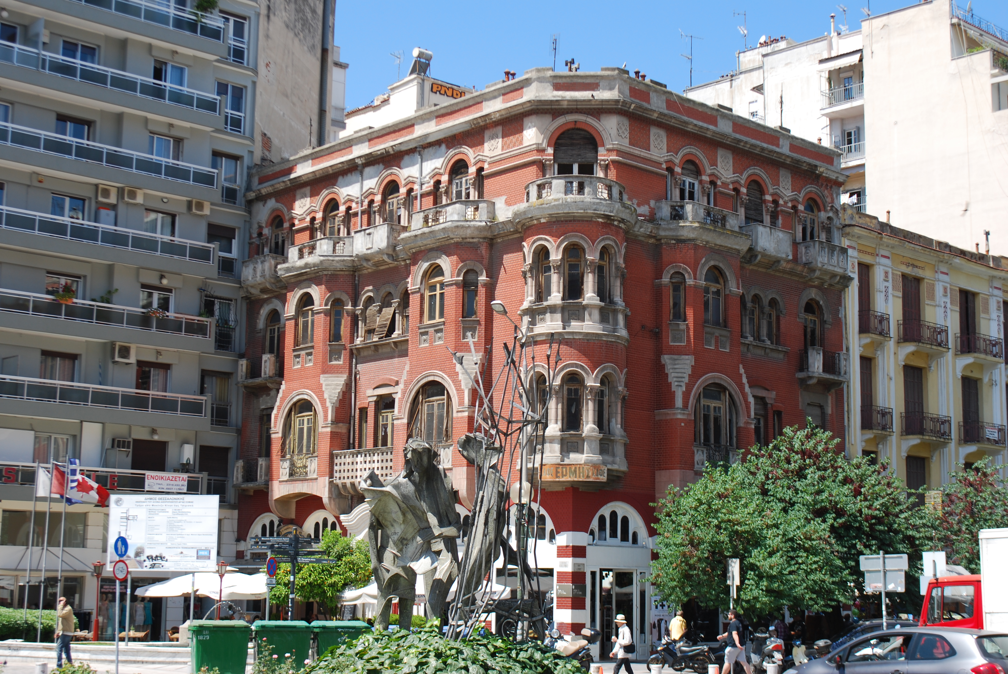 Vue de Thessalonique.